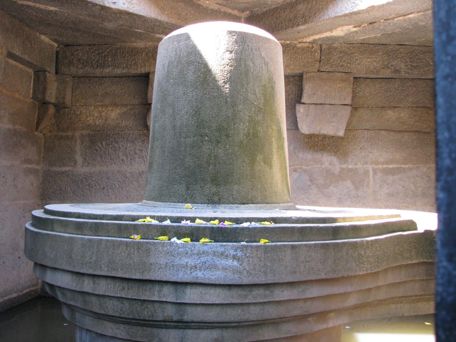 Hampi